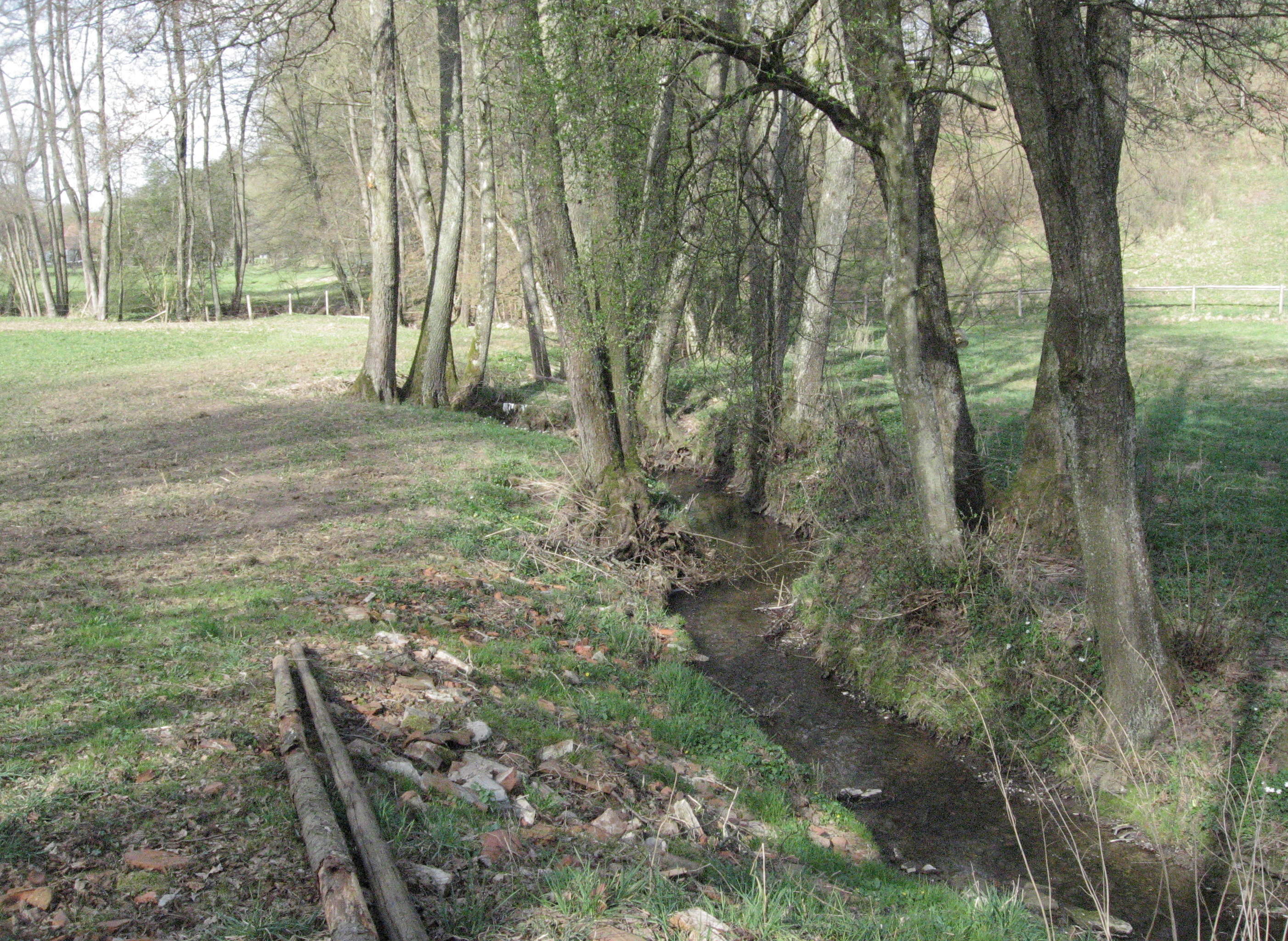 Der Hambach mäandriert in seiner Wiesenaue zwischen Bühlerzell-Hölzle und Bühlerzell-Heilberg kurz vor seinem Zusammenfluss mit dem Klingenbach. Blick flussabwärts..